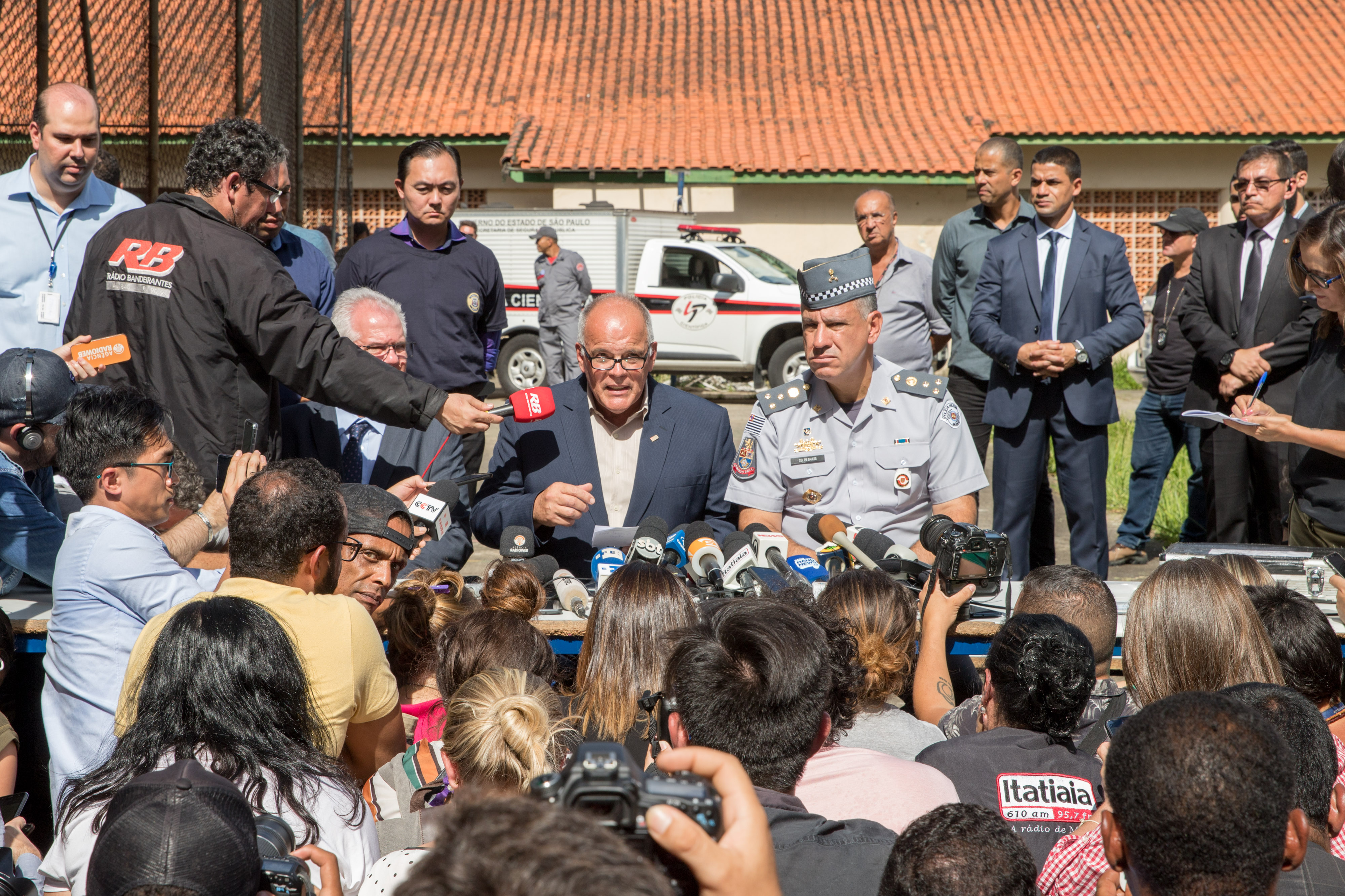 Secretários da Segurança Pública, participam de coletiva de imprensa na Escola Raul Brasil. Local: São Paulo/SP.Data: 13/03/2019 Foto: Governo do Estado de São Paulo